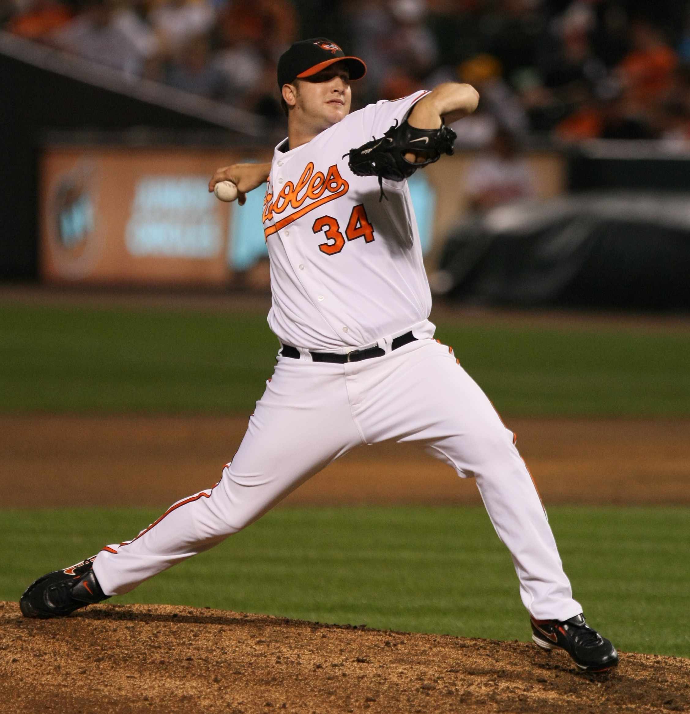 Matt Albers